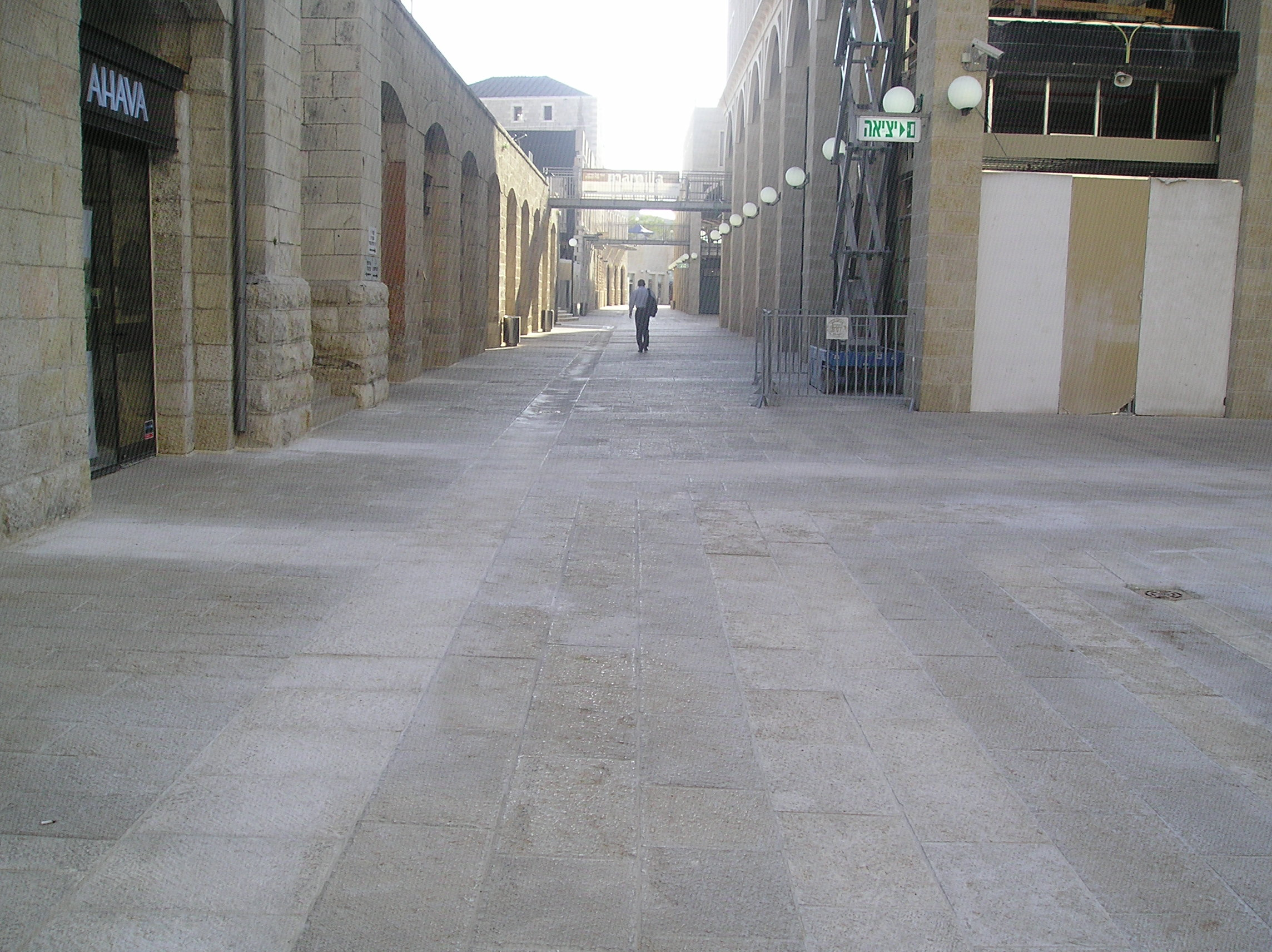 Stone Paving Mamila st. Jerusalem Israel